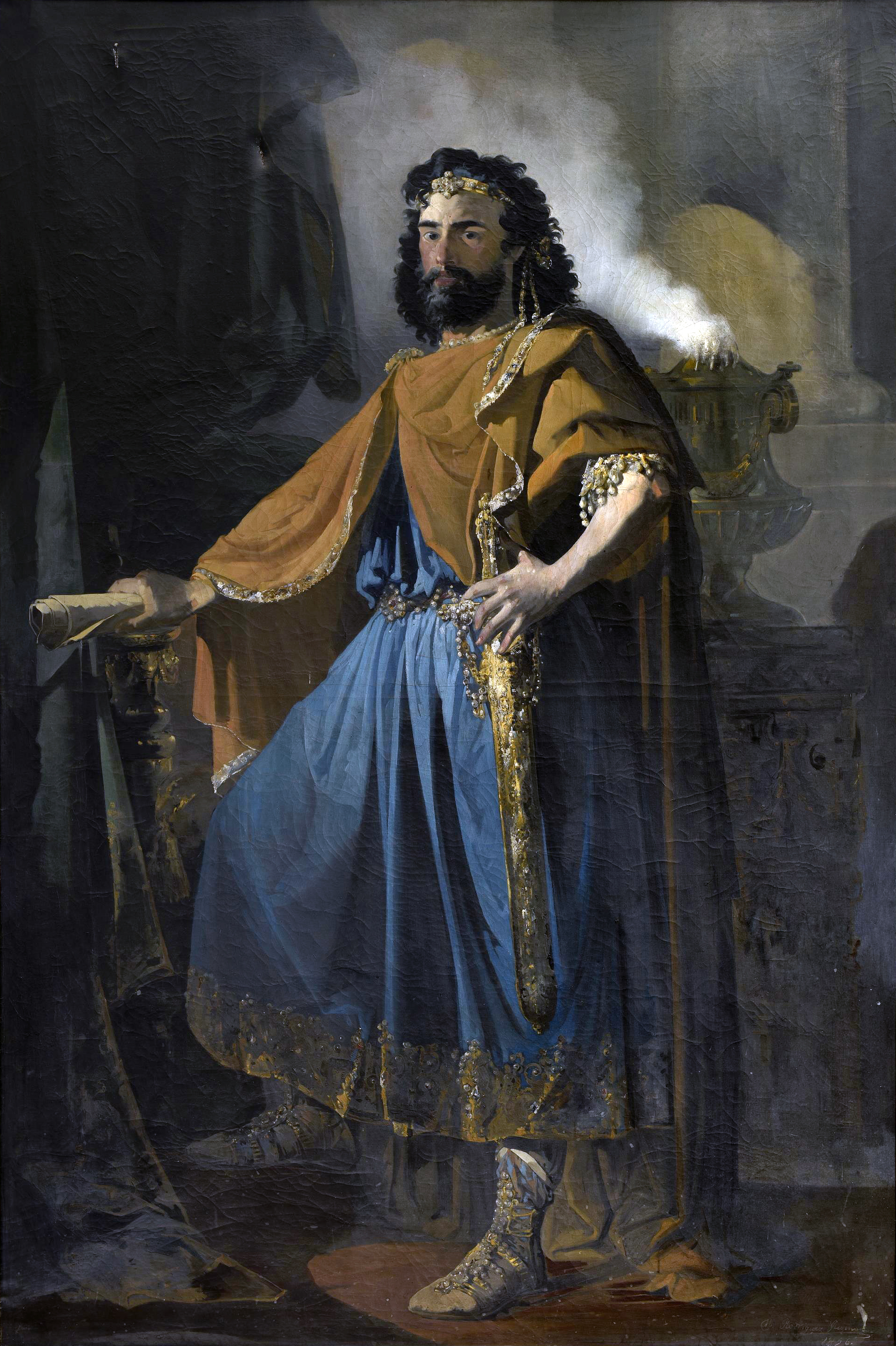 Retrato imaginario de Eurico (440–484), rey de los Visigodos e hijo del rey Teodorico I y hermano de Teodorico II, a quien sucedió en el trono después de asesinarlo.